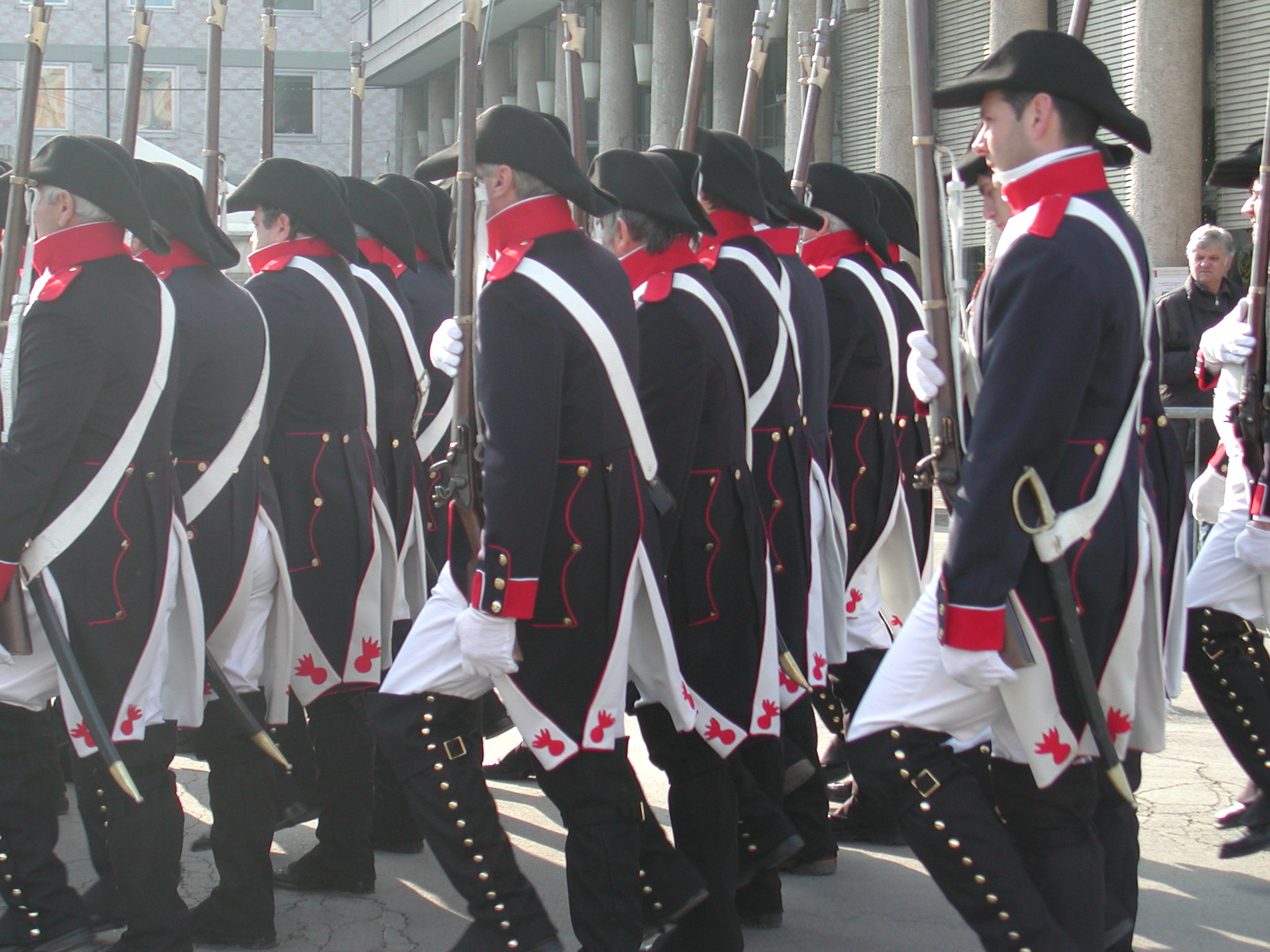 Civil Guard, Guardia Civica di Reggio Emilia (costumi ispirati all'epoca napoleonica)